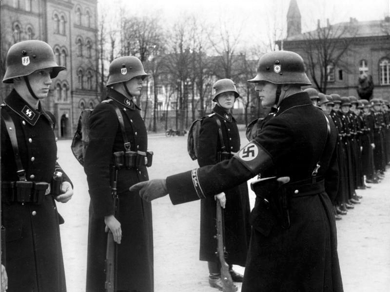 Berlin, Kaserne der LSSAH, Vergatterung Zentralbild Die Leibstandarte "Adolf Hitler" der SS-Verfügungstruppe, die für den persönlichen Schutz Adolf Hitlers verantwortlich ist. U.B.z: Um 12 Uhr ist die "Vergatterung". Der Führer vom Dienst prüft vorher den Wachanzug. Aufnahme vom 22.11.1938 [Berlin-Lichterfelde, Kaserne der Leibstandarte-SS Adolf Hitler (ehemalige Preußische Kadettenanstalt)]